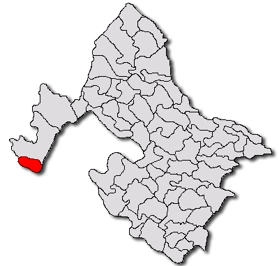 Categorie:Hărţi ale judeţului Mehedinţi